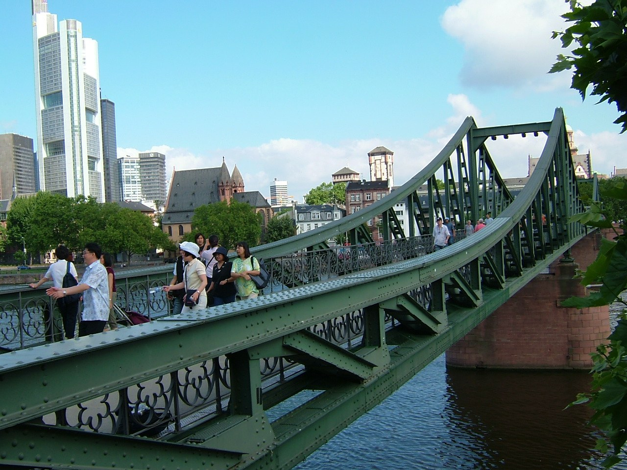 Frankfurtam Main Eisenersteg 18.06.2005 Selbst Fotografirt Zustimmung zur Veröffentlichung unter GNU FDL wurde per Mail erteilt